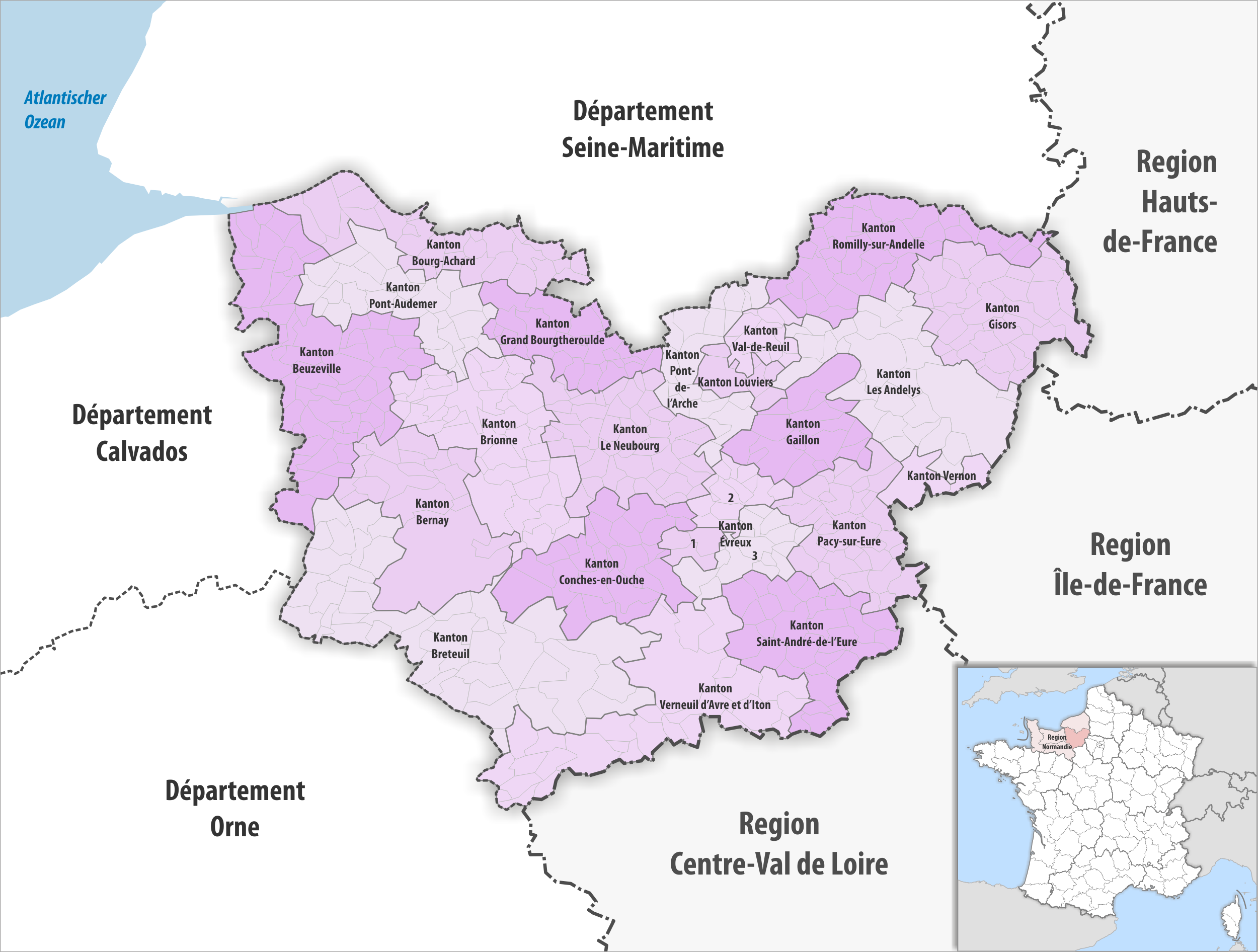 Gemeinden und Kantone im Departement Eure